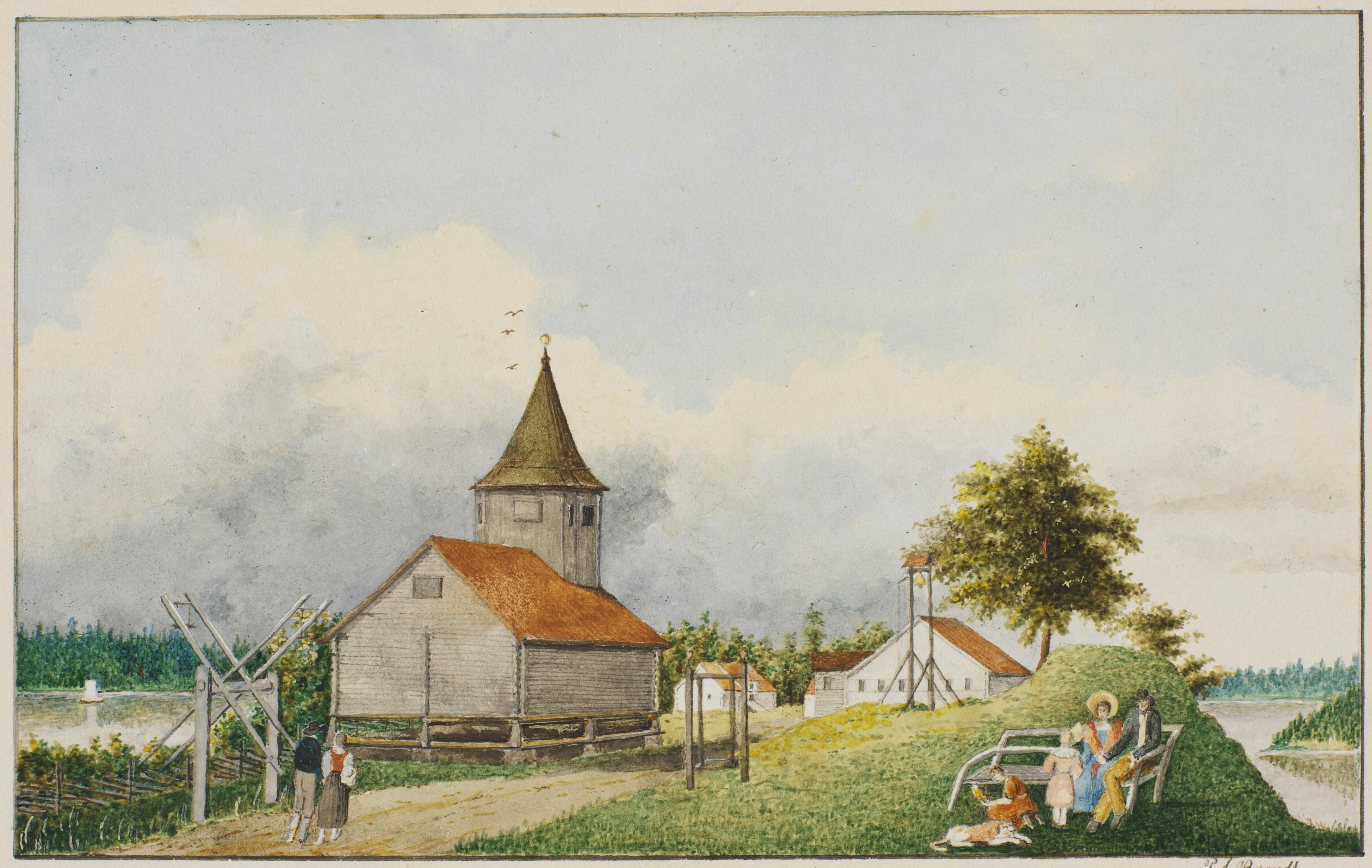 Illustrasjon hentet fra et privatarkiv i Nasjonalbiblioteket med tittelen "Storøen i Ringeriket" av Peter Andreas Brandt.